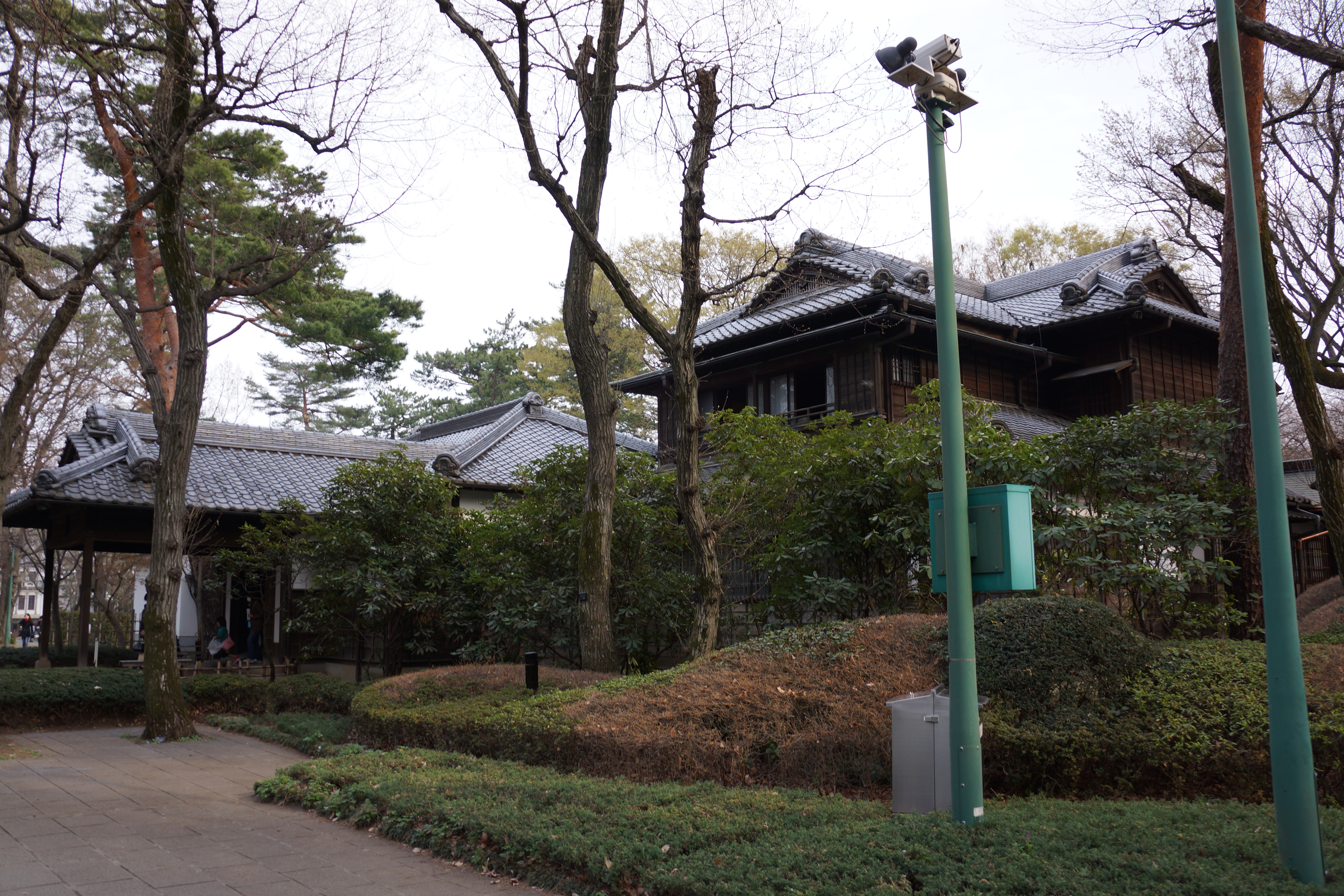 江戸東京たてもの園の高橋是清邸。